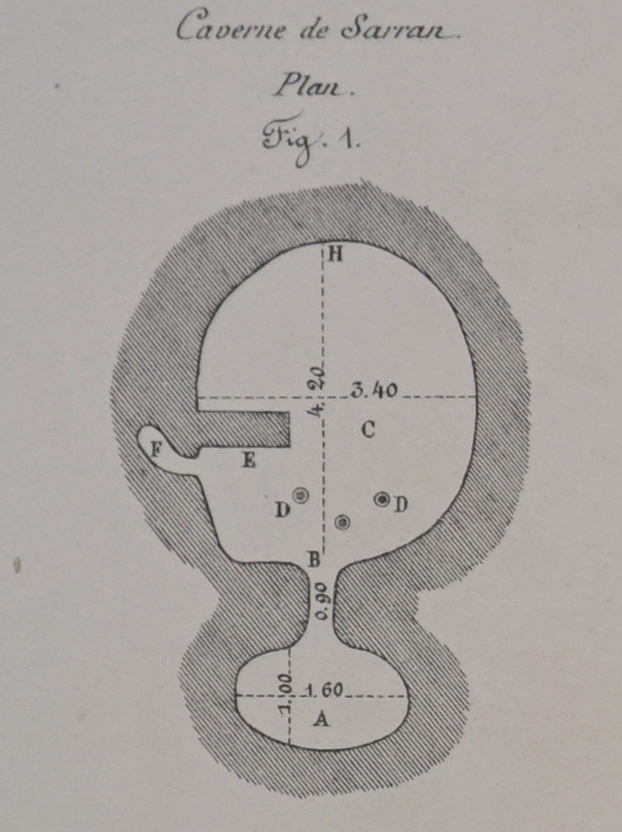 une lithographie présentant les fouilles.